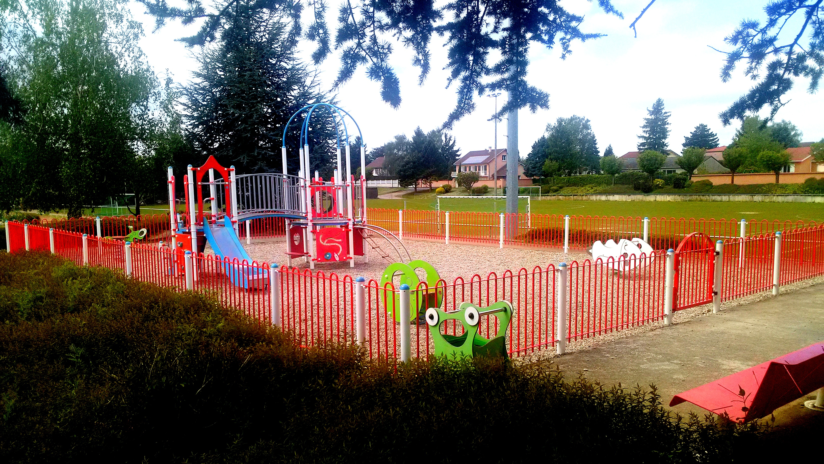 espace jeux pour enfants